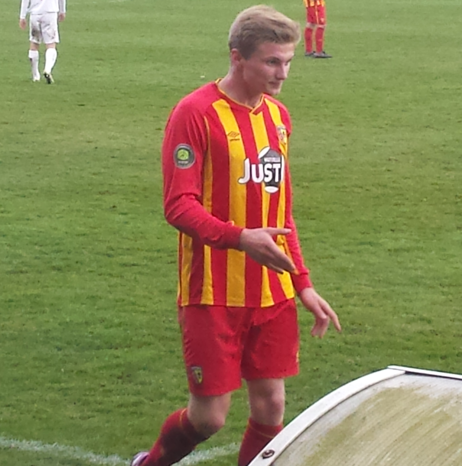 Taylor Moore, après son remplacement, lors du match RC Lens B / Lille OSC B, comptant pour la vingt-quatrième journée du championnat de CFA (quatrième division française), le 4 avril 2015 au Stade François-Blin d'Avion.